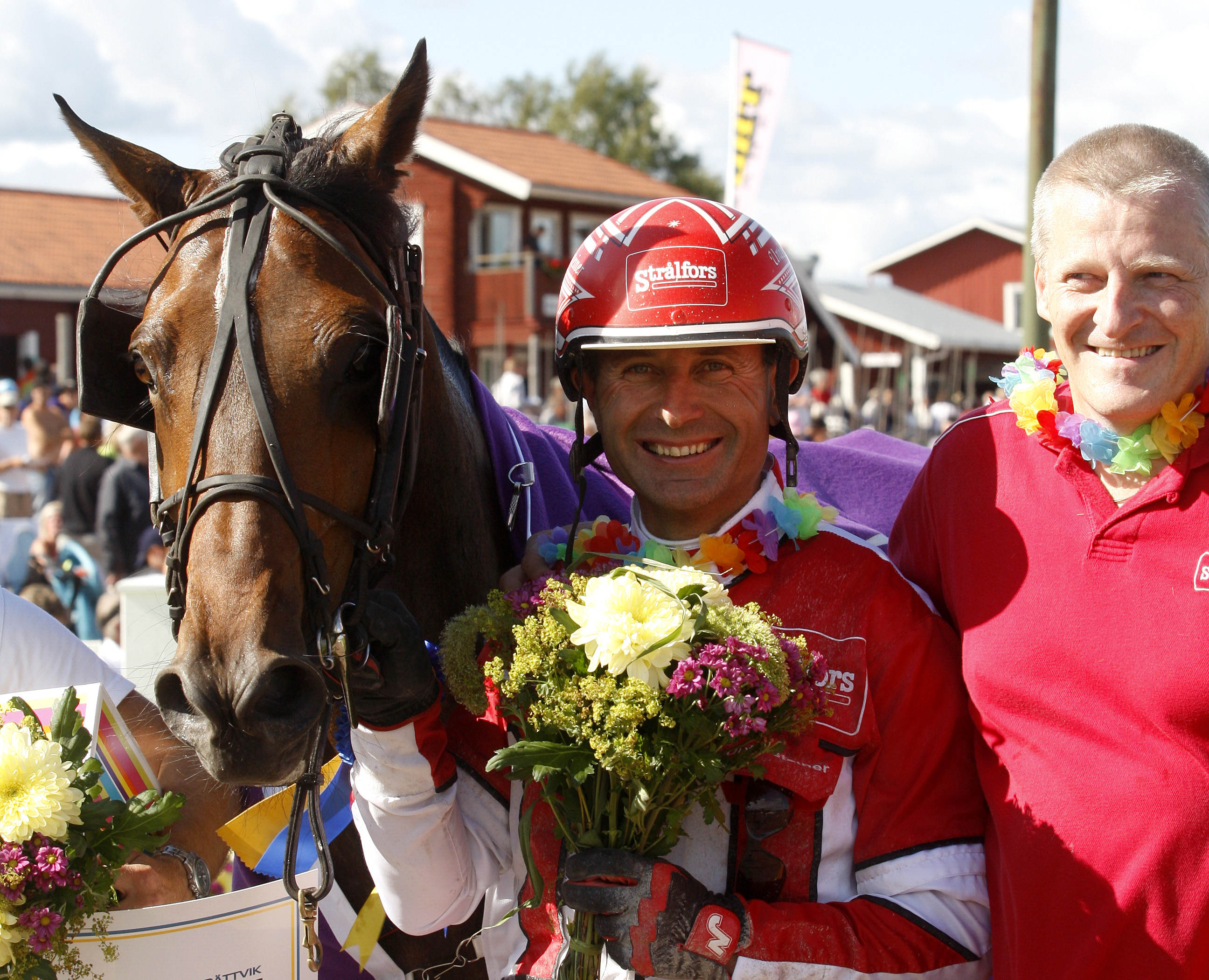 Harry Haythrow, kusken Peter Untersteiner & tränare Johnny Johansson efter segern i Klass I på Rättvikstravet, 2011-08-06.